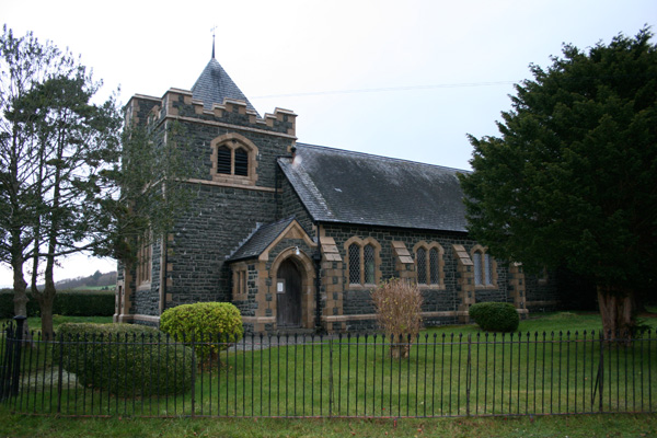 Eglwys Dewi Sant, Tal-y-bont, Ceredigion